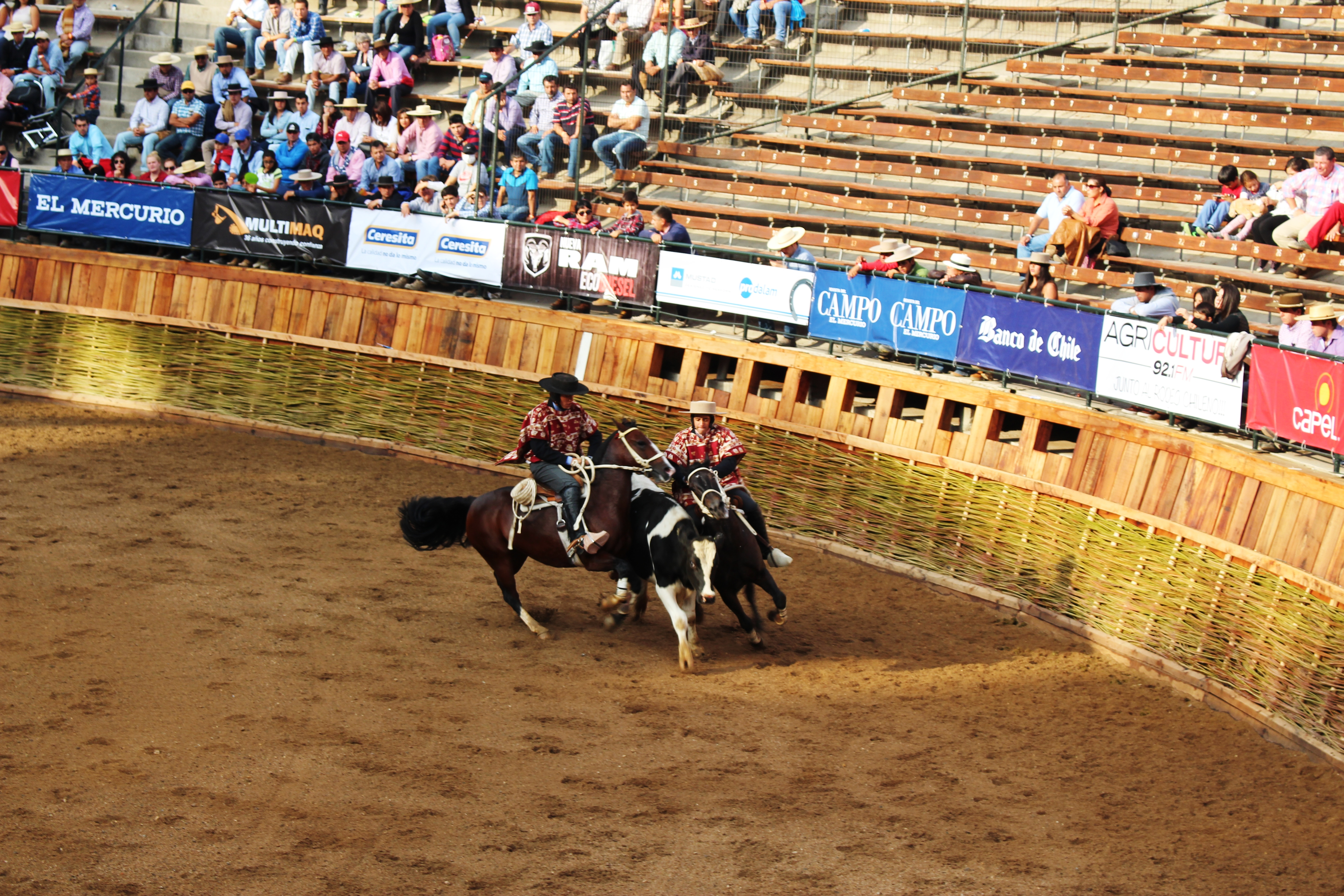 Campeonato Nacional de Rodeo 2016, en Media Luna Monumental de Rancagua